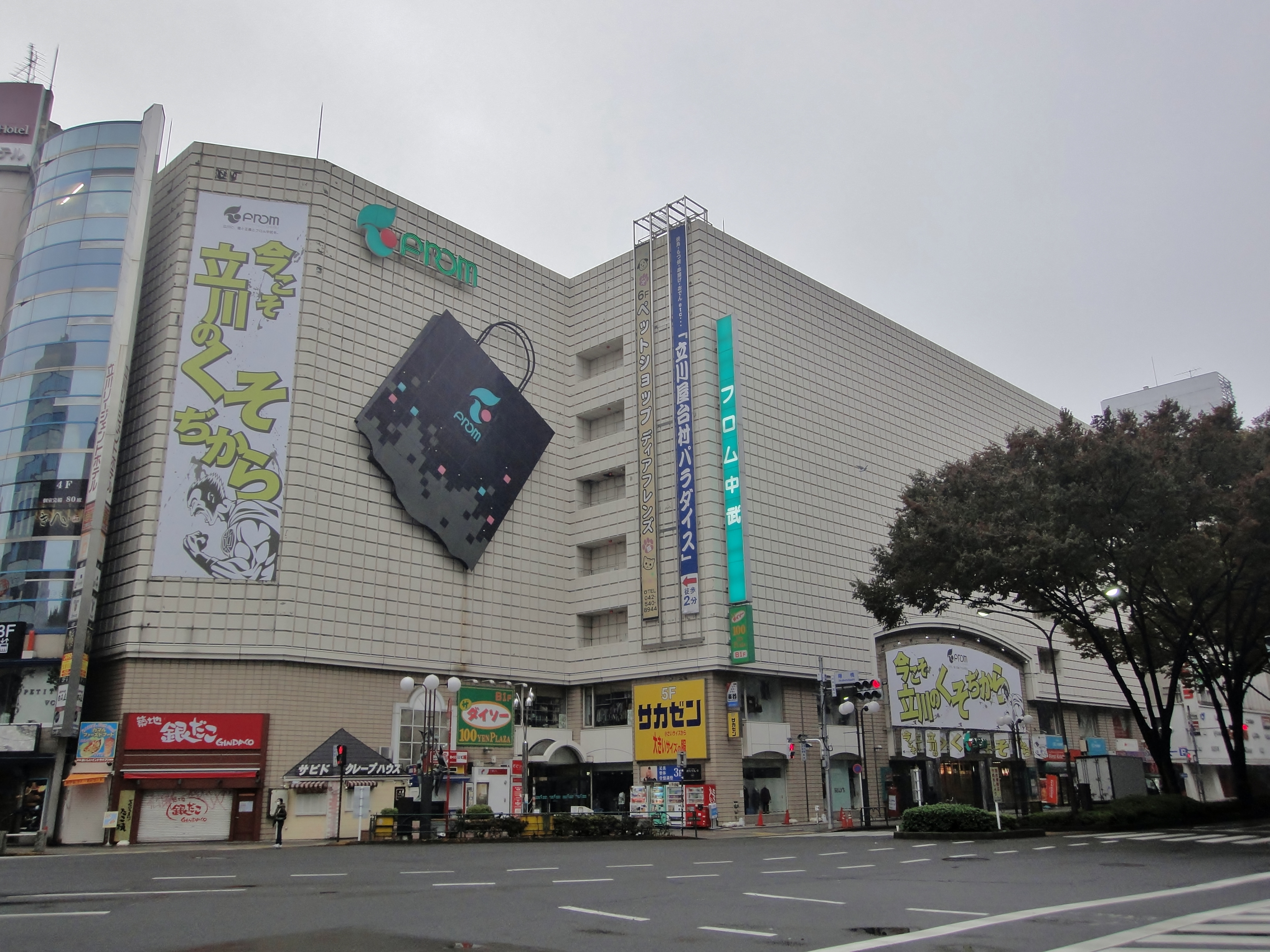 フロム中武